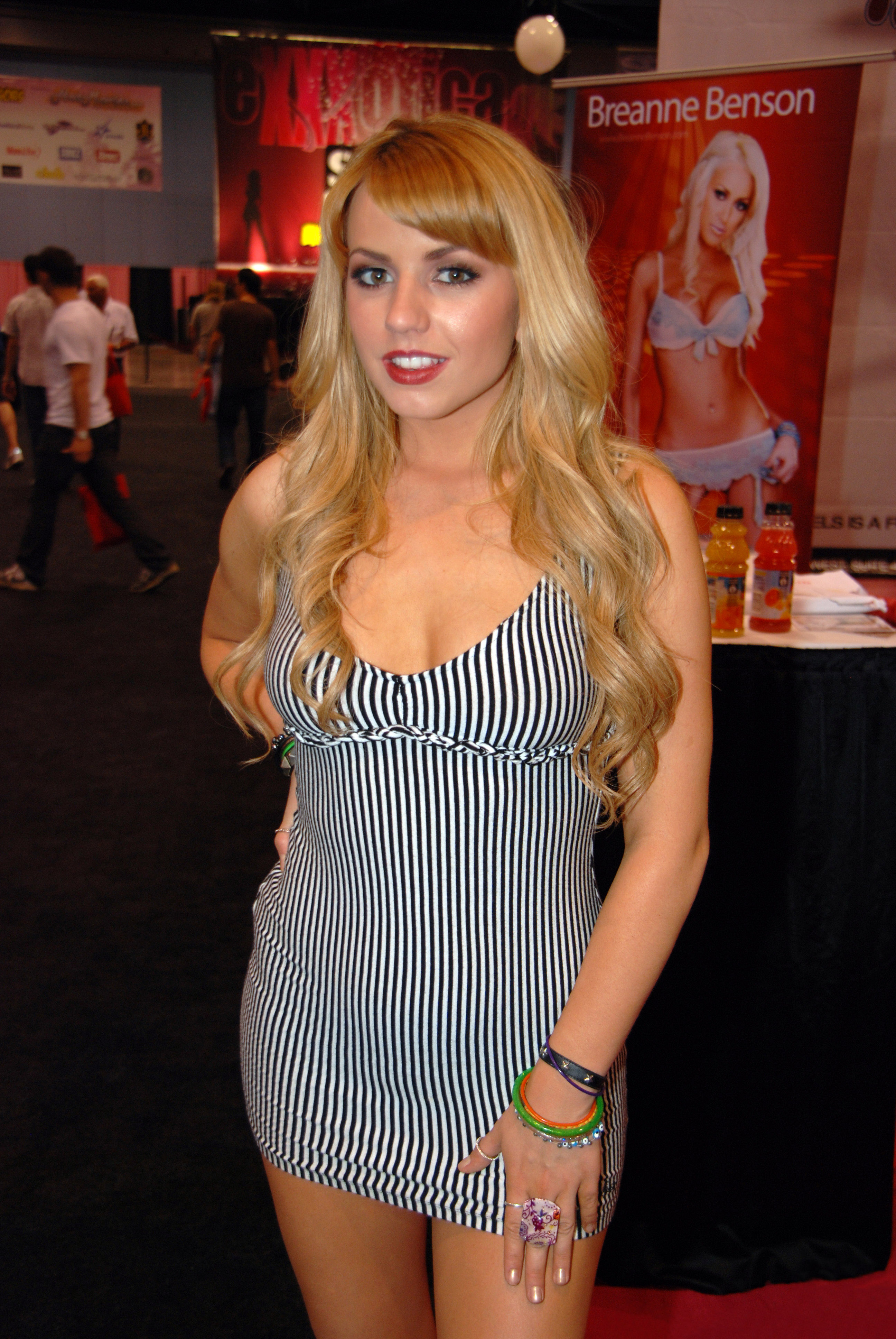 Lexi Belle at Exxxotica Miami Beach 2010